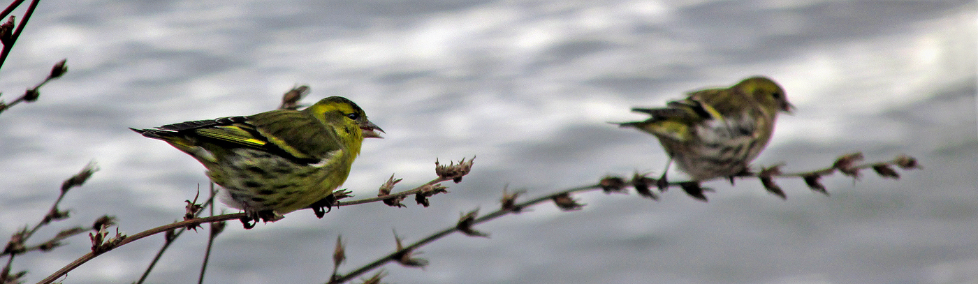 Grönsiska (Spinus spinus) Ystad 2015.